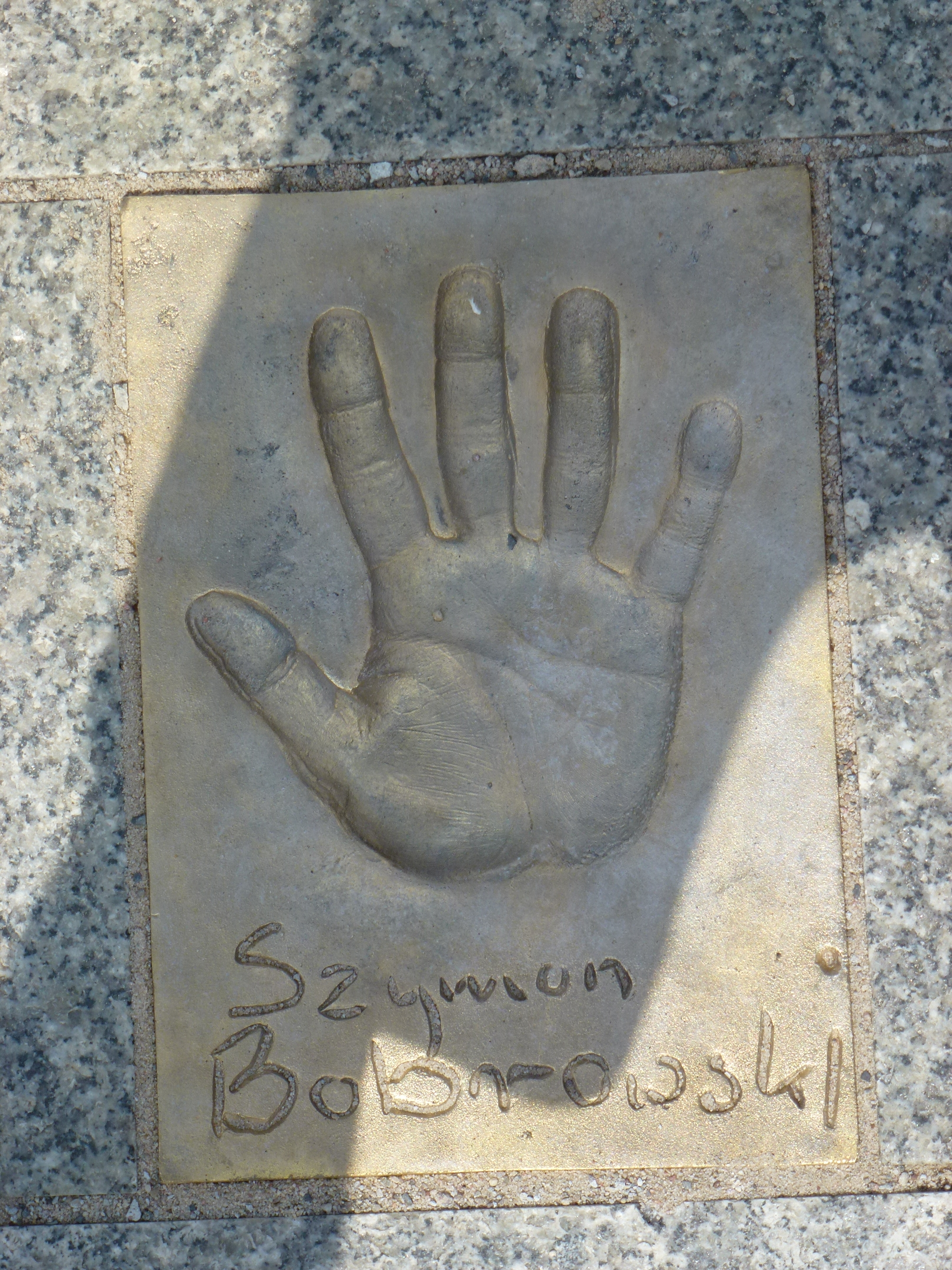 Szymon Bobrowski, odcisk dłoni gwiazdy na Alei Gwiazd w Międzyzdrojach, woj. zachodniopomorskie, pow. kamieński.